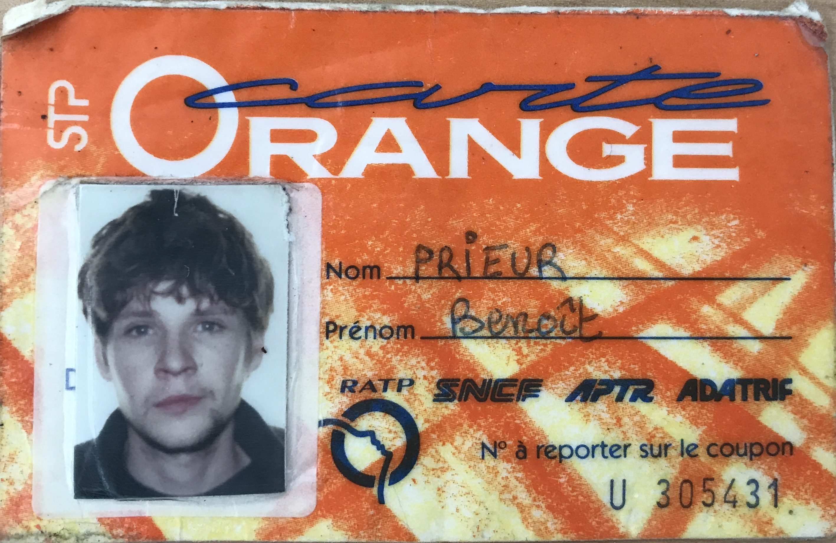 Carte Orange U 305431 abondamment utilisée au débuts des années 2000 par User:Benoît Prieur.